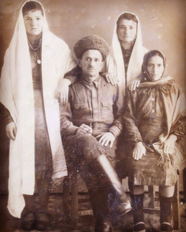 Хасхановы уроженцы Юрт-Ауха